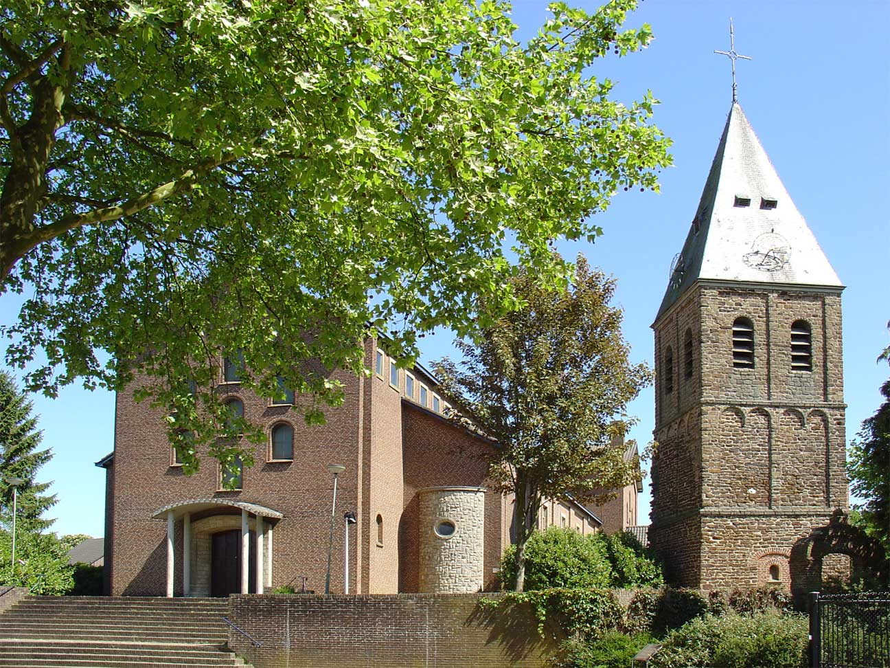 Cosmas en Damianuskerk van Afferden (Church Afferden)